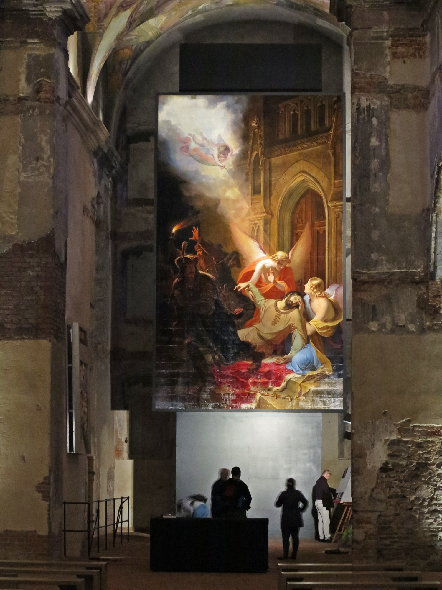 Dominikánský klášter, Pekařská 22/113 (kostel), 12/417, Solná 8/417, Mnišská, Opava-Město, Opava.